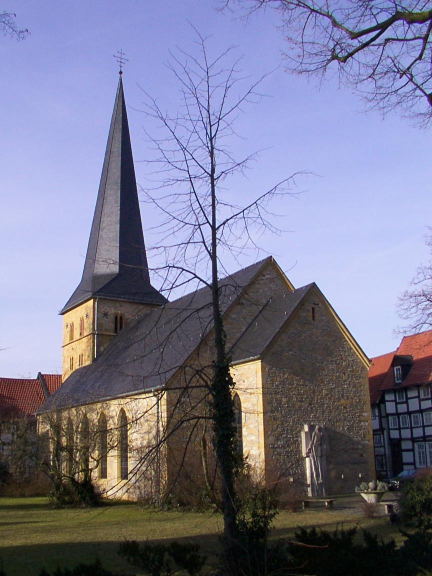 Gütersloh: evangelische Apostelkirche, ehemals Sankt Pankratius